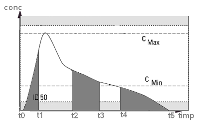 Aria de sub curbă (ASC) este un parametru mai puţin influenţat de modul de lucru, valoarea sa fiind suma ariilor trapezelor construite sub curbă